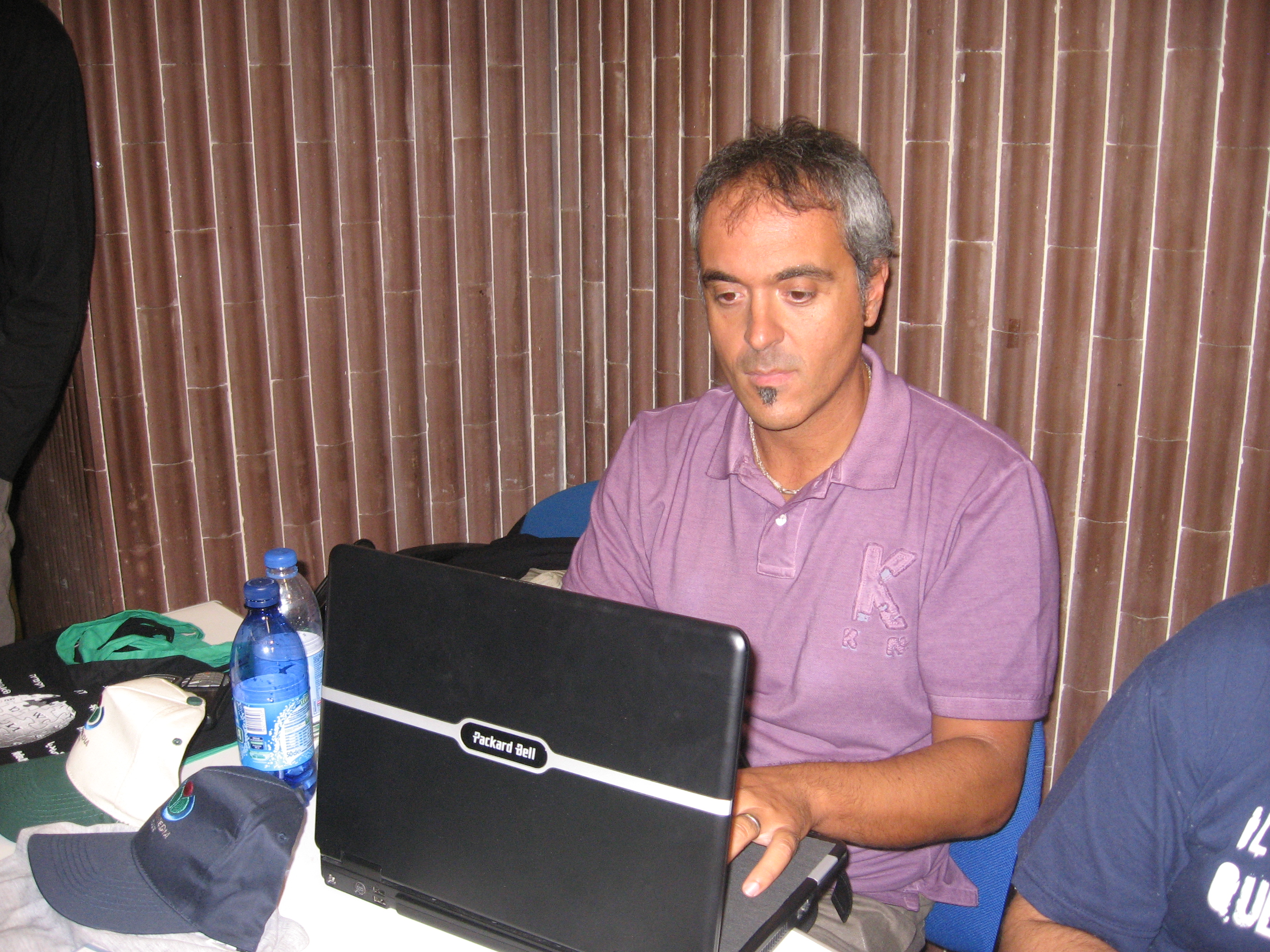 Emiliano Pagani. Arezzo - Copyleft festival 2008